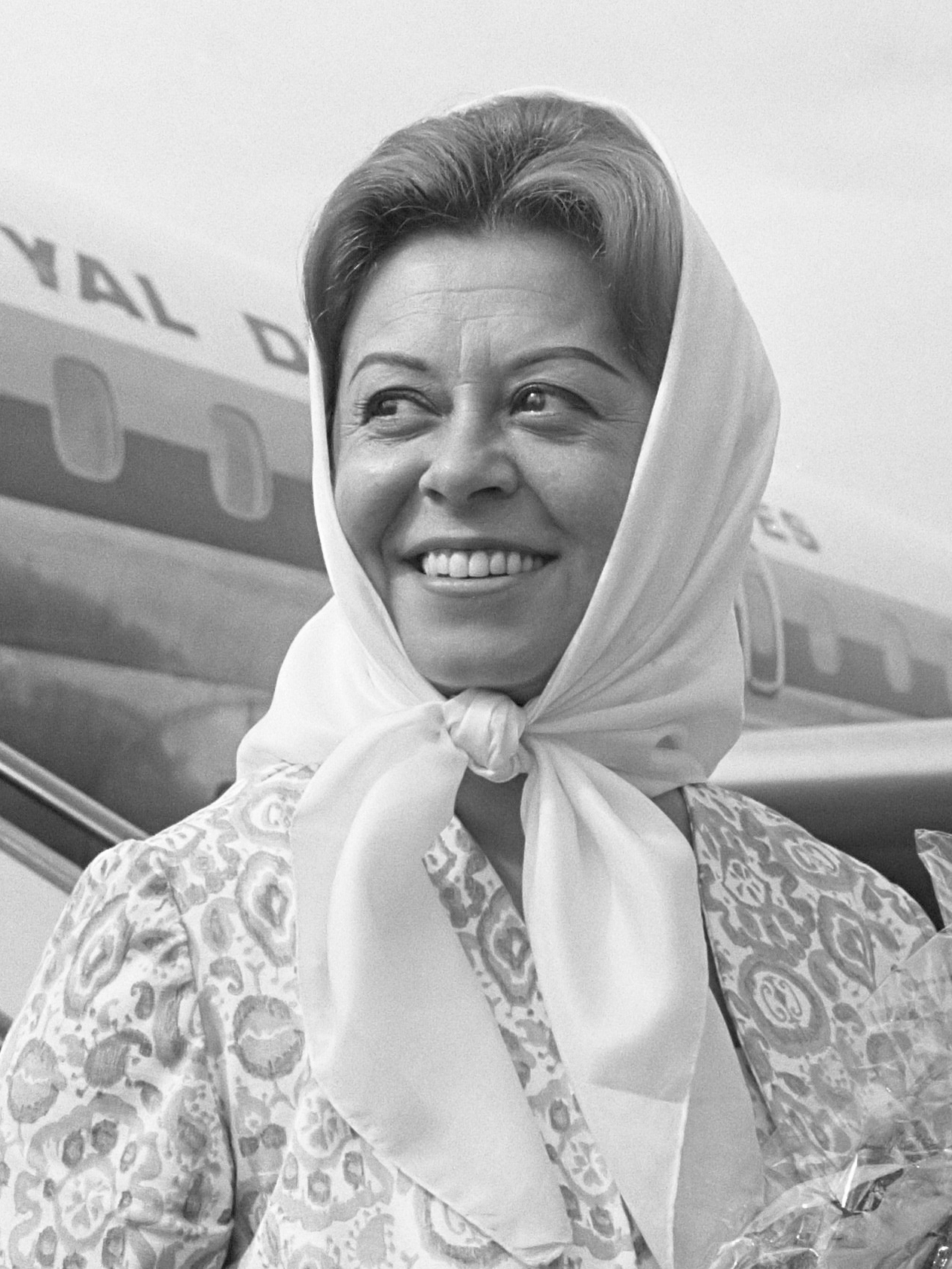 Aankomst Guliette Messina op Schiphol 5 juli 1966